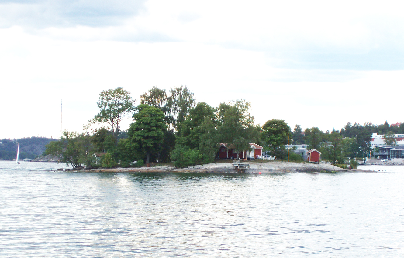 Svanholmen i Hustegafjärden utanför Lidingö.